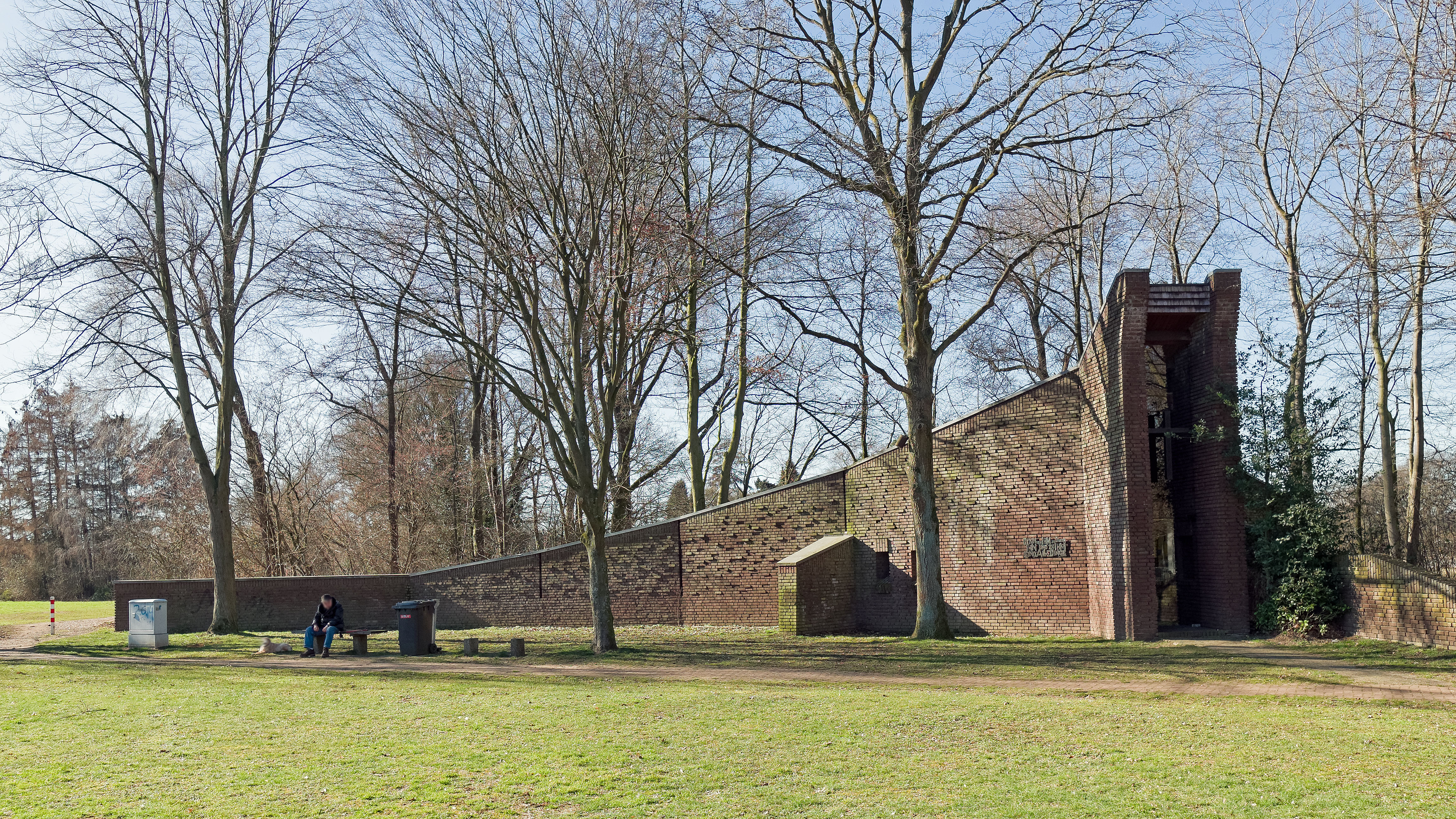 Krefeld Denkmal 960: Autobahnkapelle Geismühle